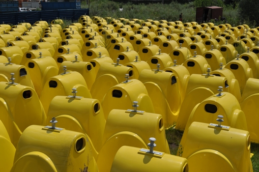 Мусорні бачки